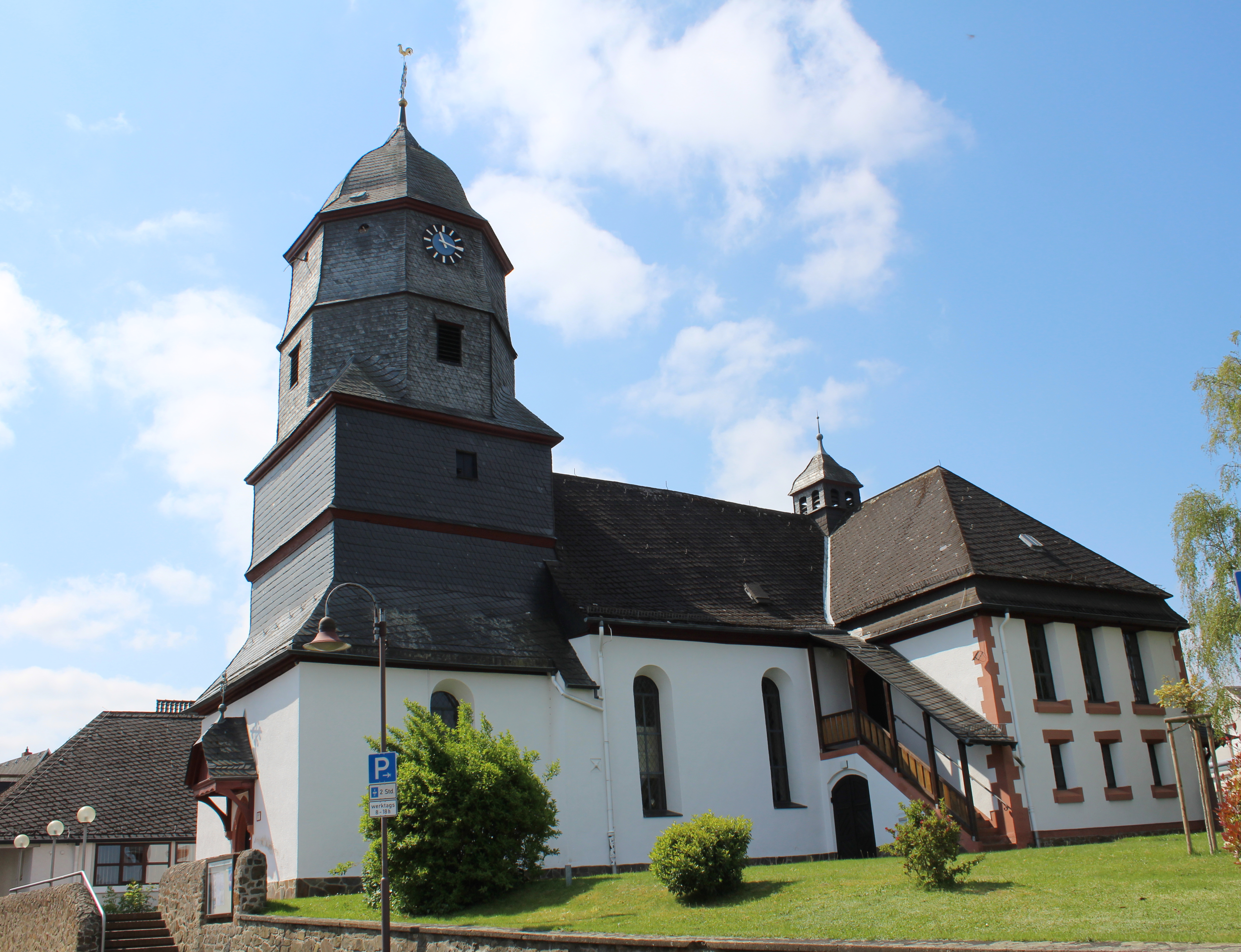 Evangelische Kirche Wetzlar-Dutenhofen, Lahn-Dill-Kreis, Hessen, Deutschland